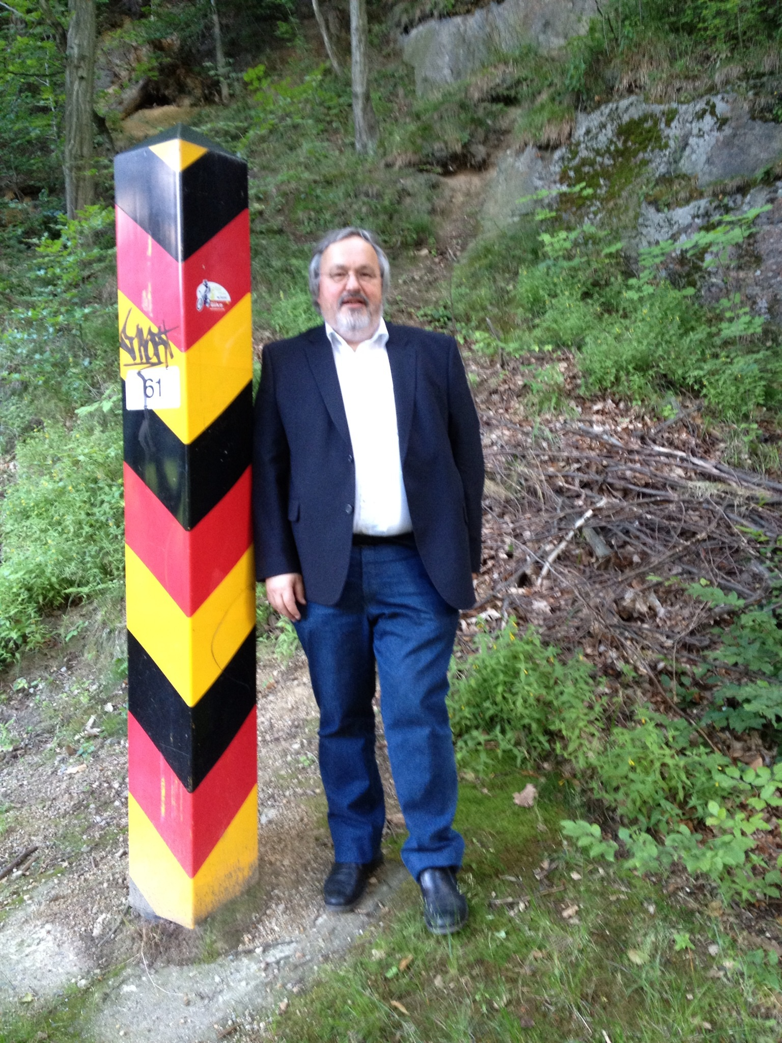 Habbel Grenzpfahl